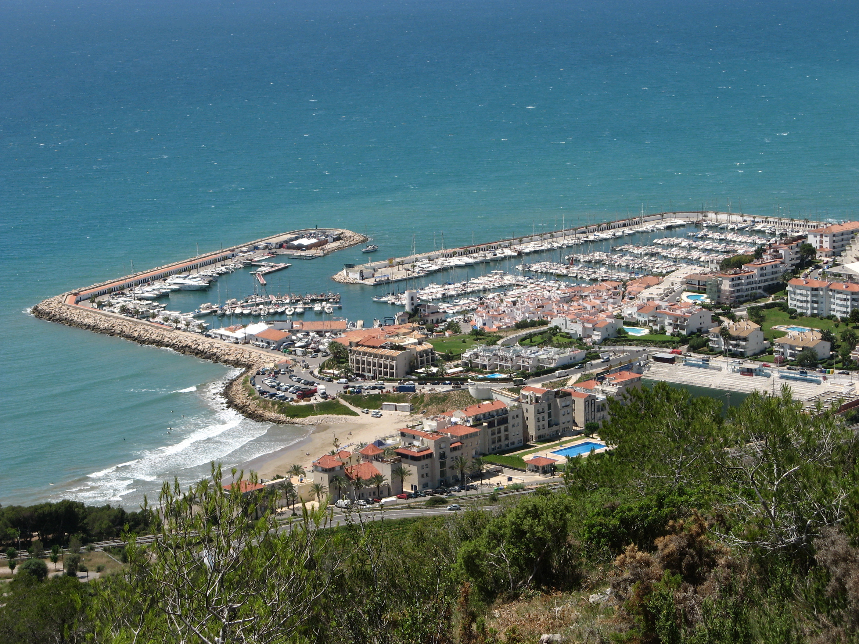 "Aiguadolç" - Hafen von Sitges (Catalonien, Spanien)